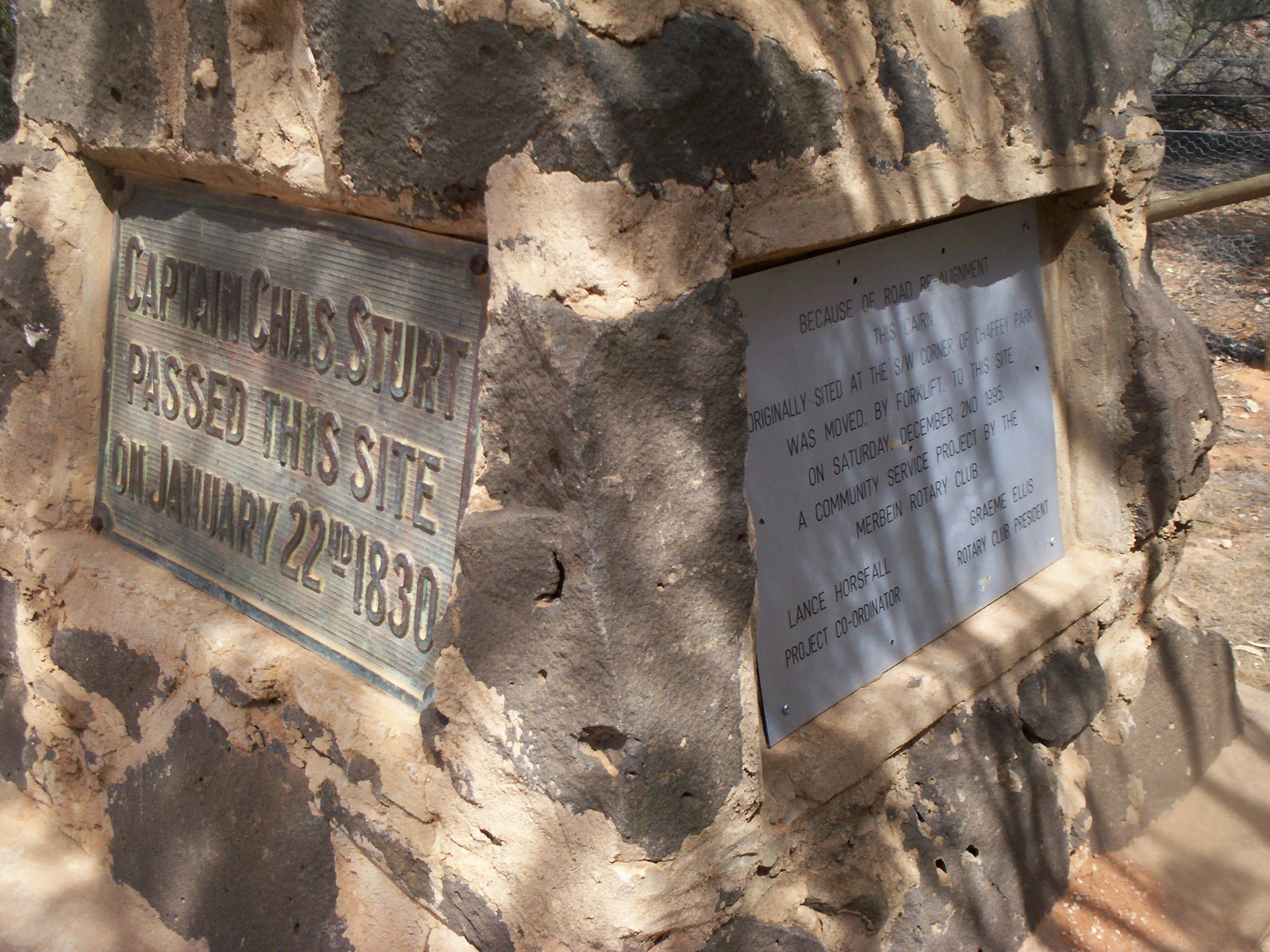 Charles Sturt Monument, Merbein